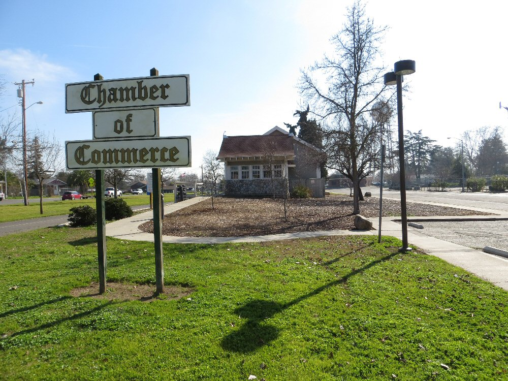 Rio Linda CA 1091